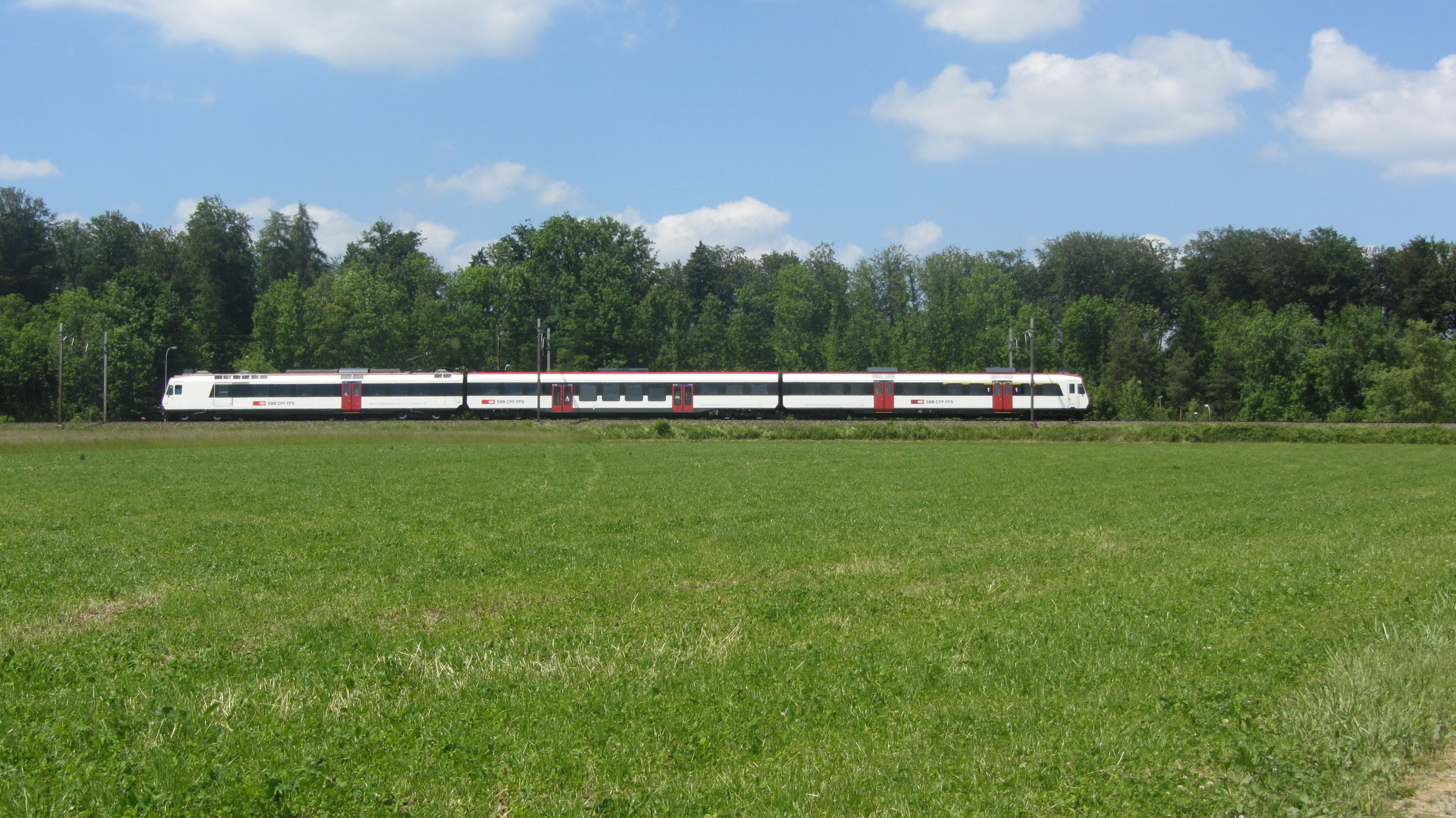 Domino